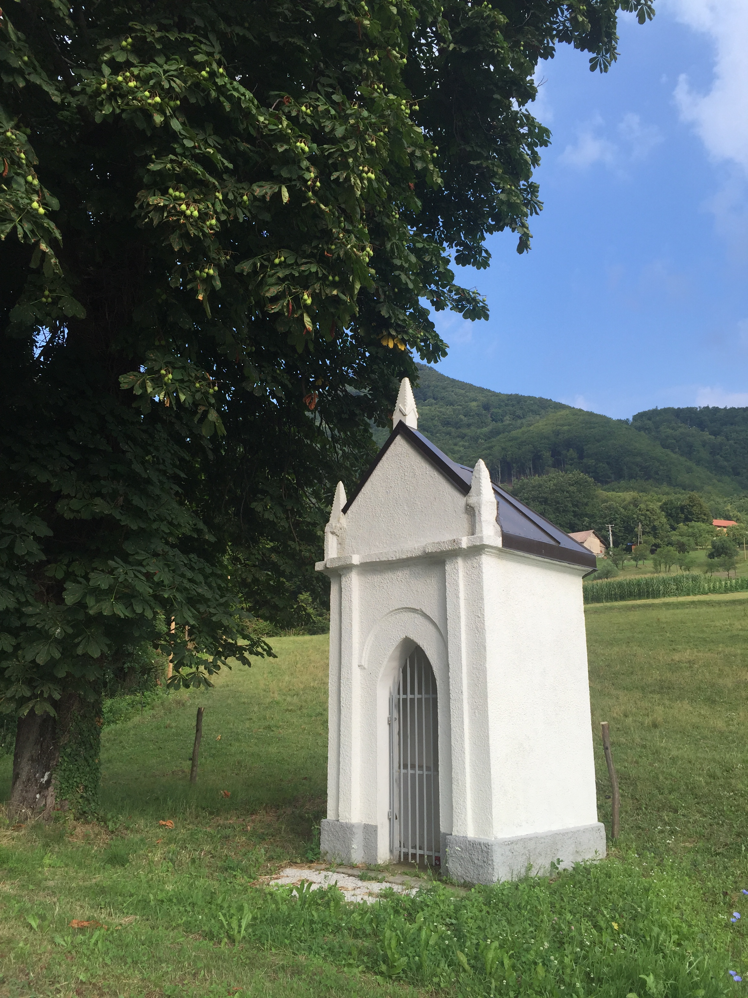 2287 Čermožiše, Slovenia